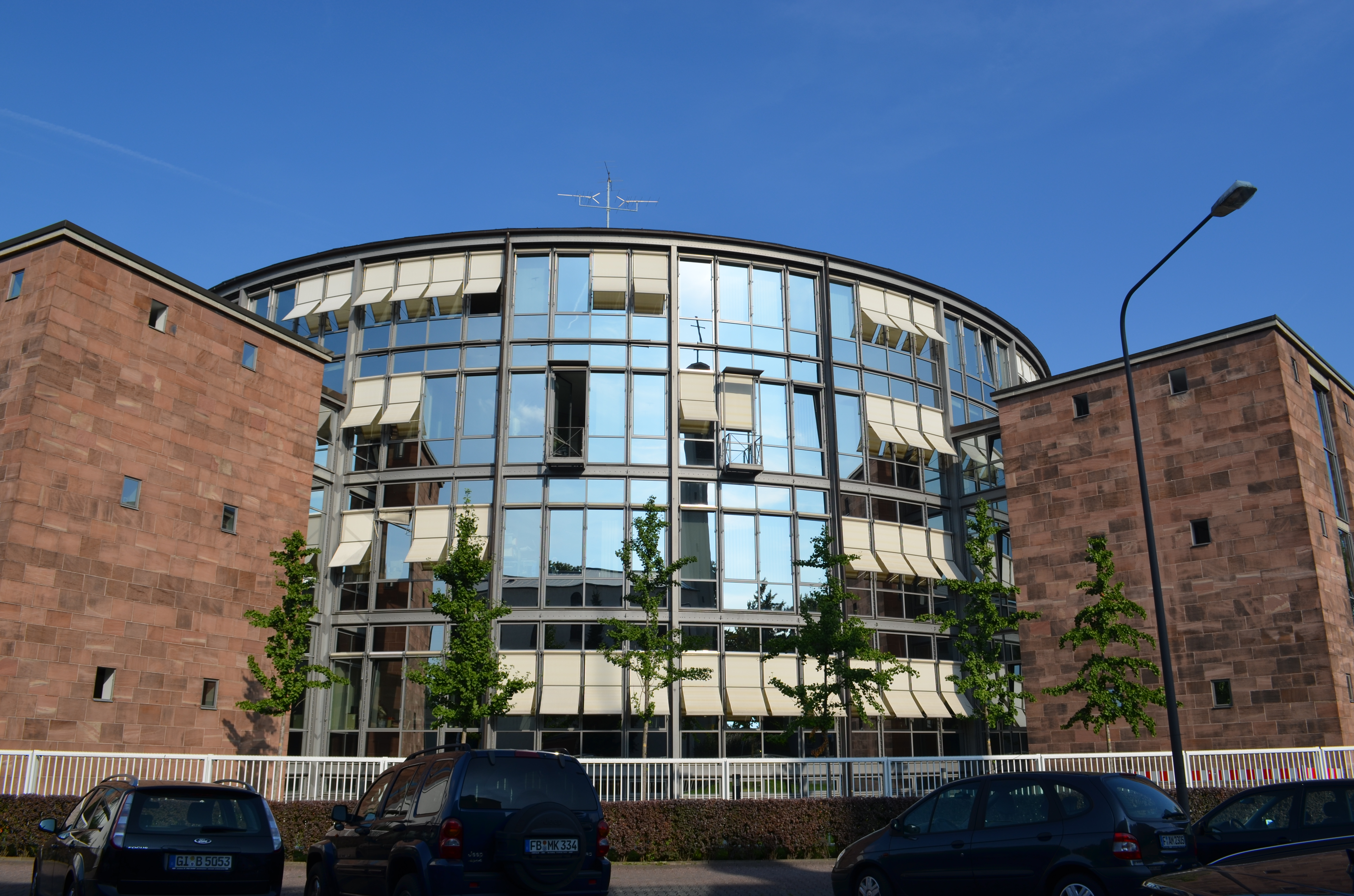 Frankfurt, HR, Rotunde